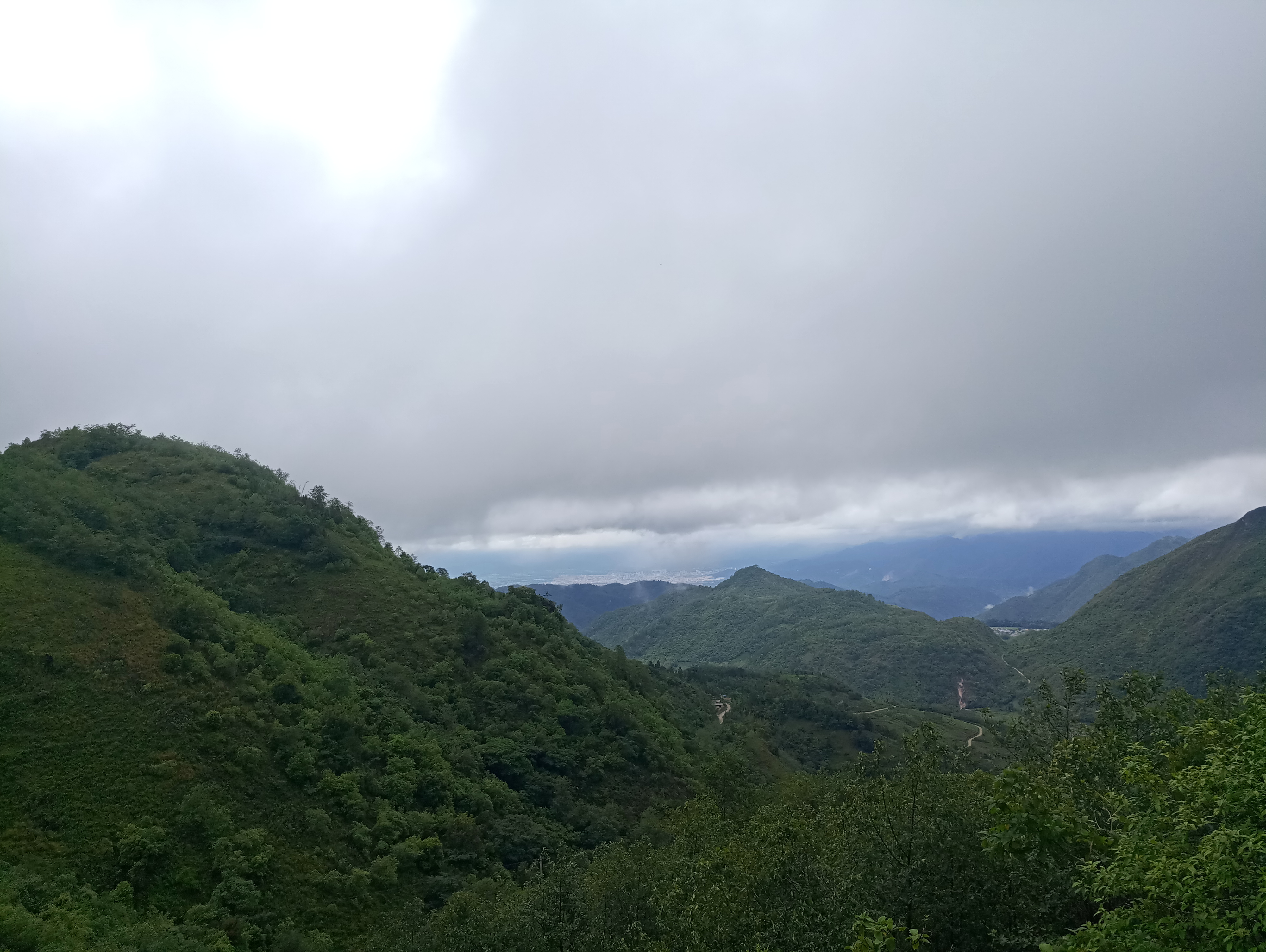 中文（中国大陆）: 摄于勐戛镇境内，芒市至中山乡的公路线，远处是芒市城区